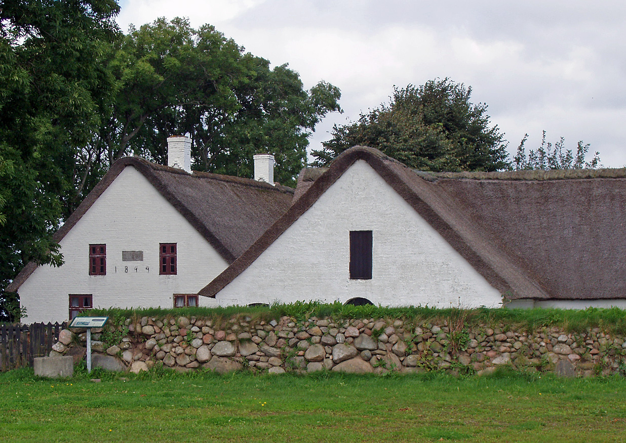 Hessel er en gammel hovedgård, som nævnes første gang i 1391. Gården ligger i Louns Sogn, Gislum Herred, Ålborg Amt, Farsø Kommune. Hessel er idag et Landbrugsmuseum